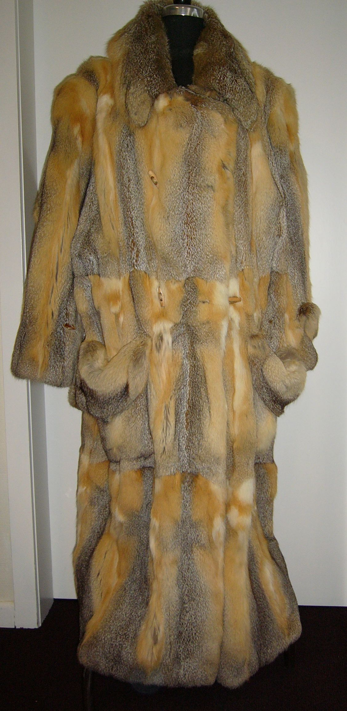 Swiftfuchsmantel.